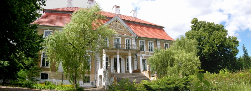 Pałac w Stolcu